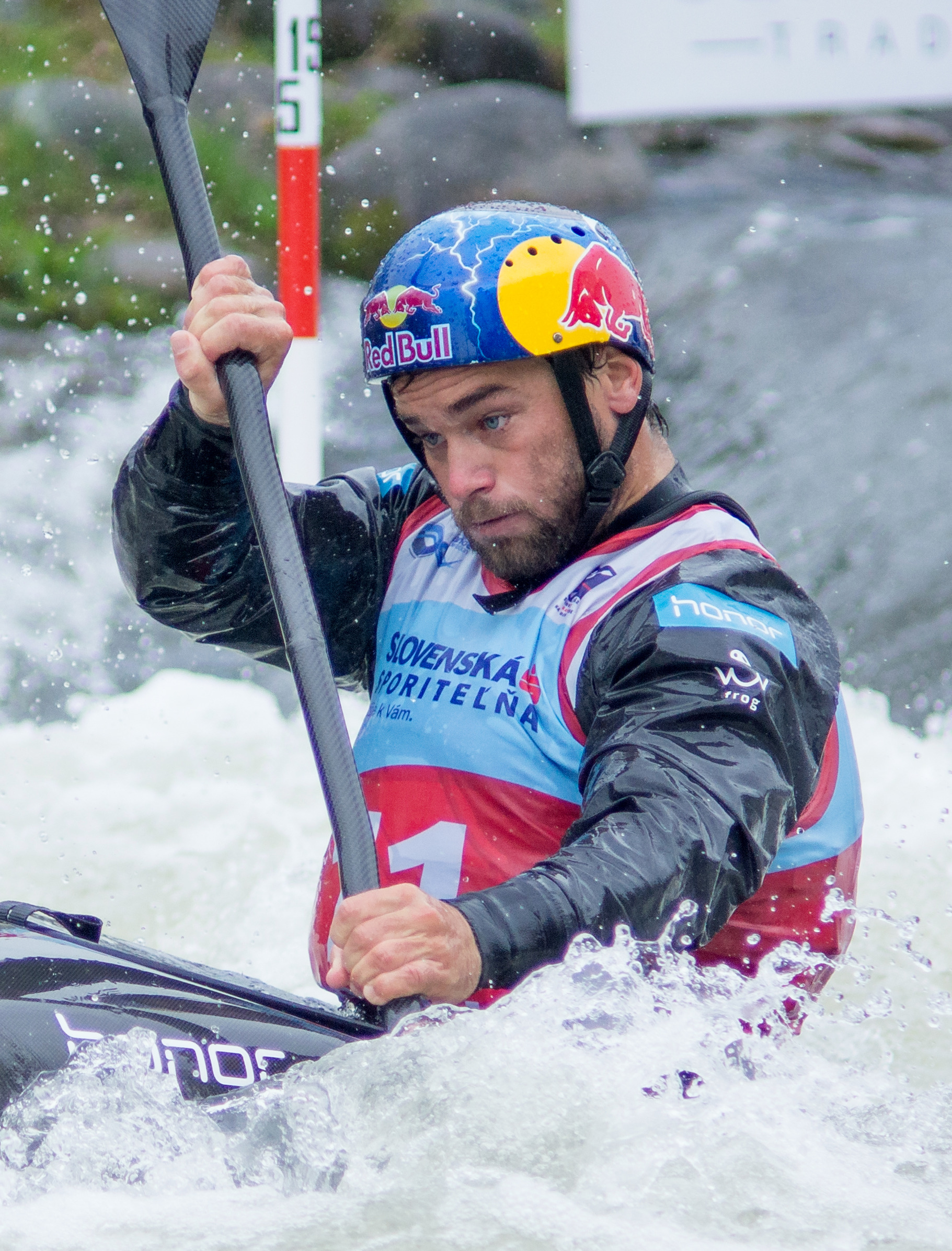 Vávra Hradilek